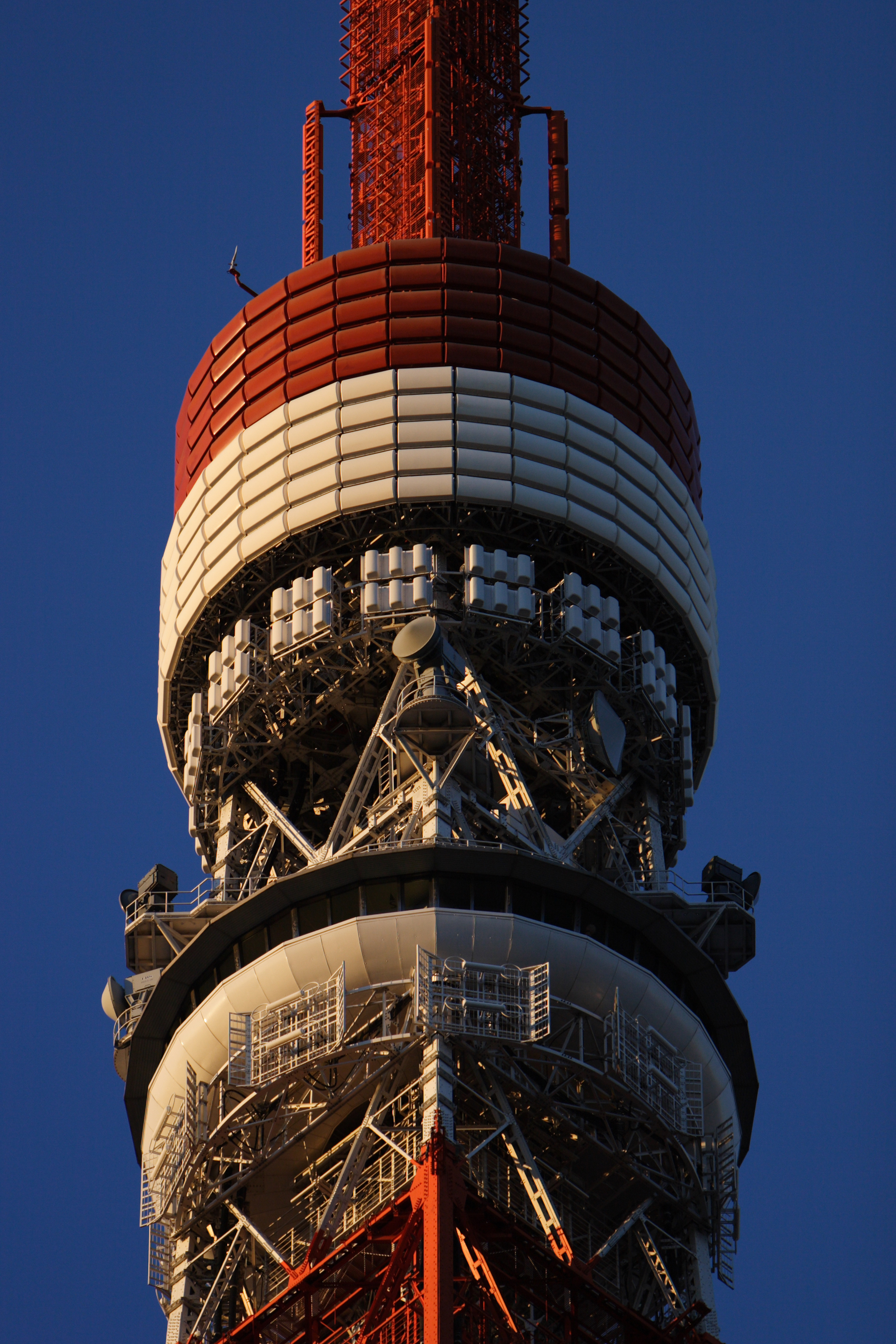 [MAP]